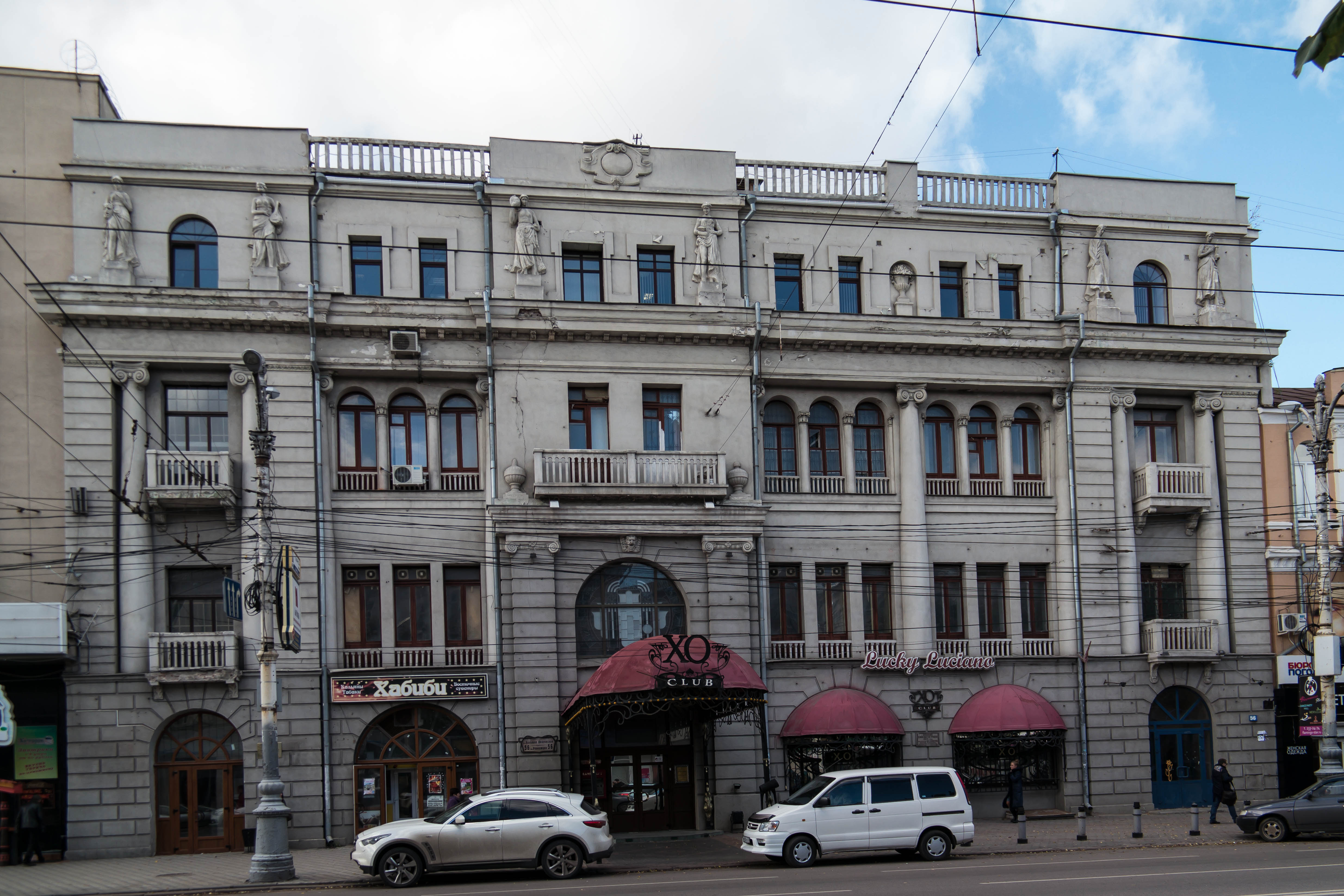 Здание кинематографа (Воронежская область, Воронеж, Революции пр., 56)